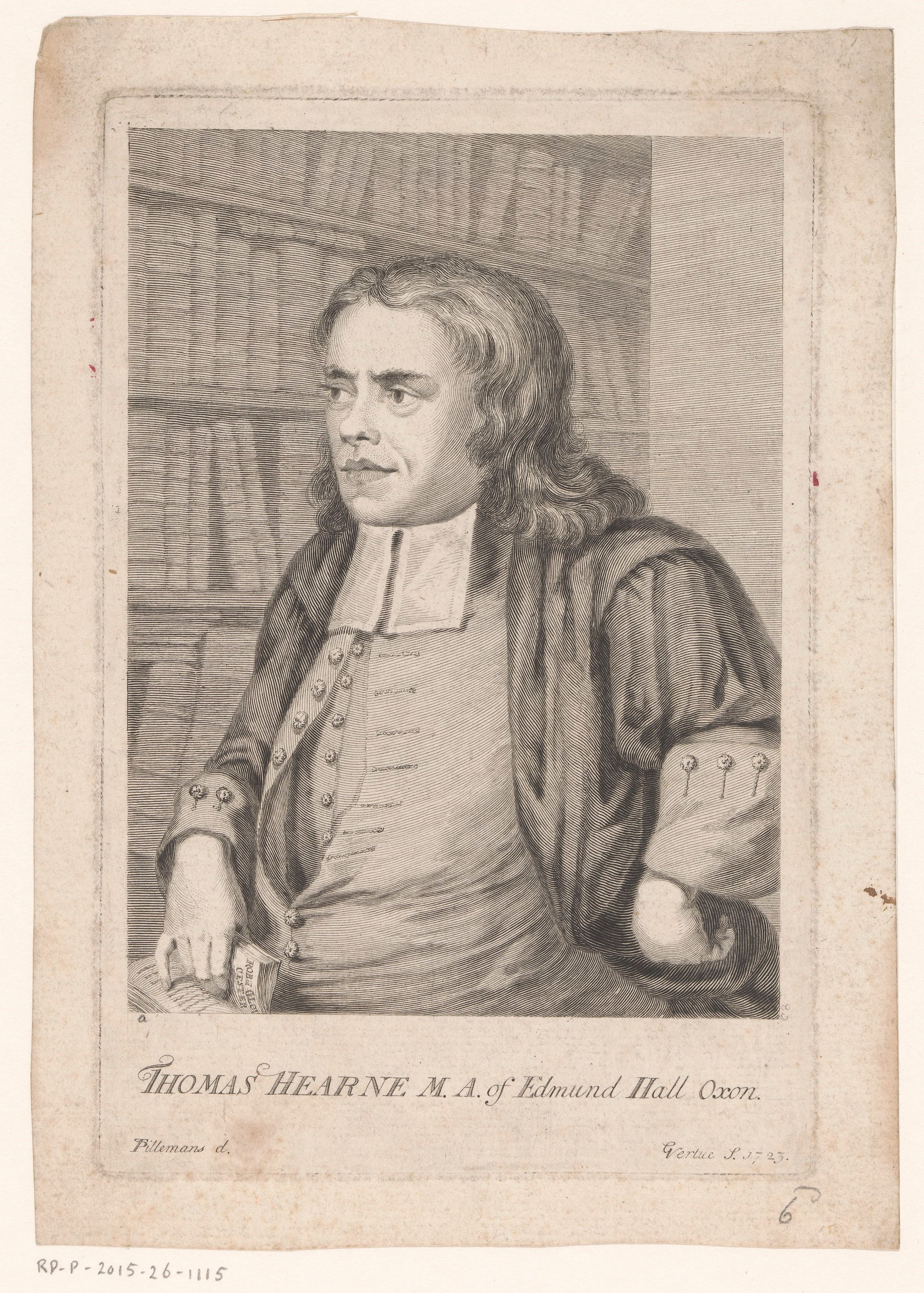 IdentificatieTitel(s): Portret van de oudheidkundige Thomas HearneThomas Hearne M.A. of Edmund Hall Oxon (titel op object)Objecttype: prent Objectnummer: RP-P-2015-26-1115Opschriften / Merken: verzamelaarsmerk, verso, gestempeld: Lugt 2228Omschrijving: Thomas Hearne foor een boekenkast met in zijn rechterhand een geopend boek, getiteld: 'Rob of Gloucester'.VervaardigingVervaardiger: prentmaker: George Vertue (vermeld op object)naar ontwerp van: Peter Tillemans (vermeld op object)Datering: 1723Fysieke kenmerken: gravureMateriaal: papier Techniek: graveren (drukprocedé)Afmetingen: plaatrand: h 200 mm × b 132 mmOnderwerpWat: scholar in his studyWie: Thomas HearneVerwerving en rechtenCredit line: Legaat van de heer S. Emmering, AmsterdamVerwerving: legaat 2000Copyright: Publiek domein